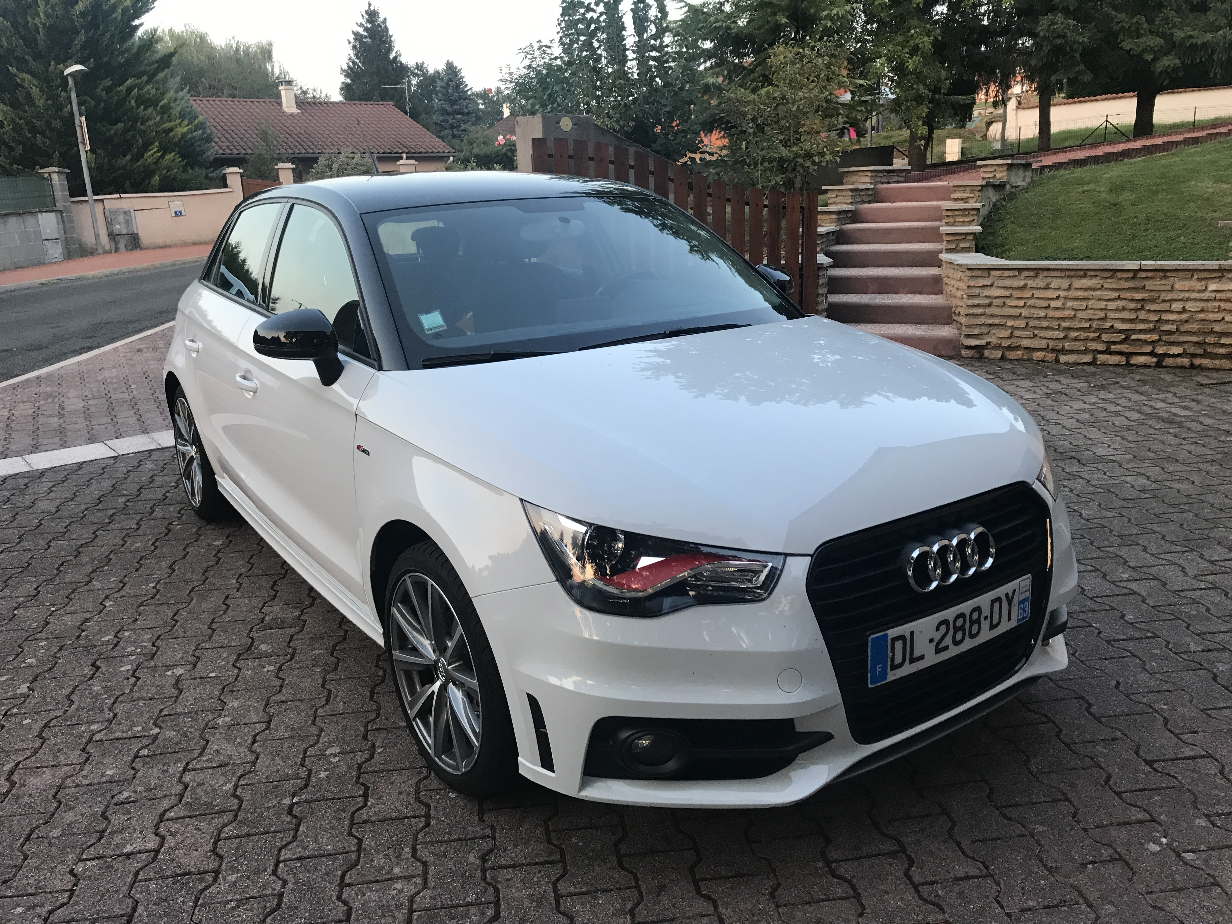 Audi A1 8X (Vue 3/4 Avant)